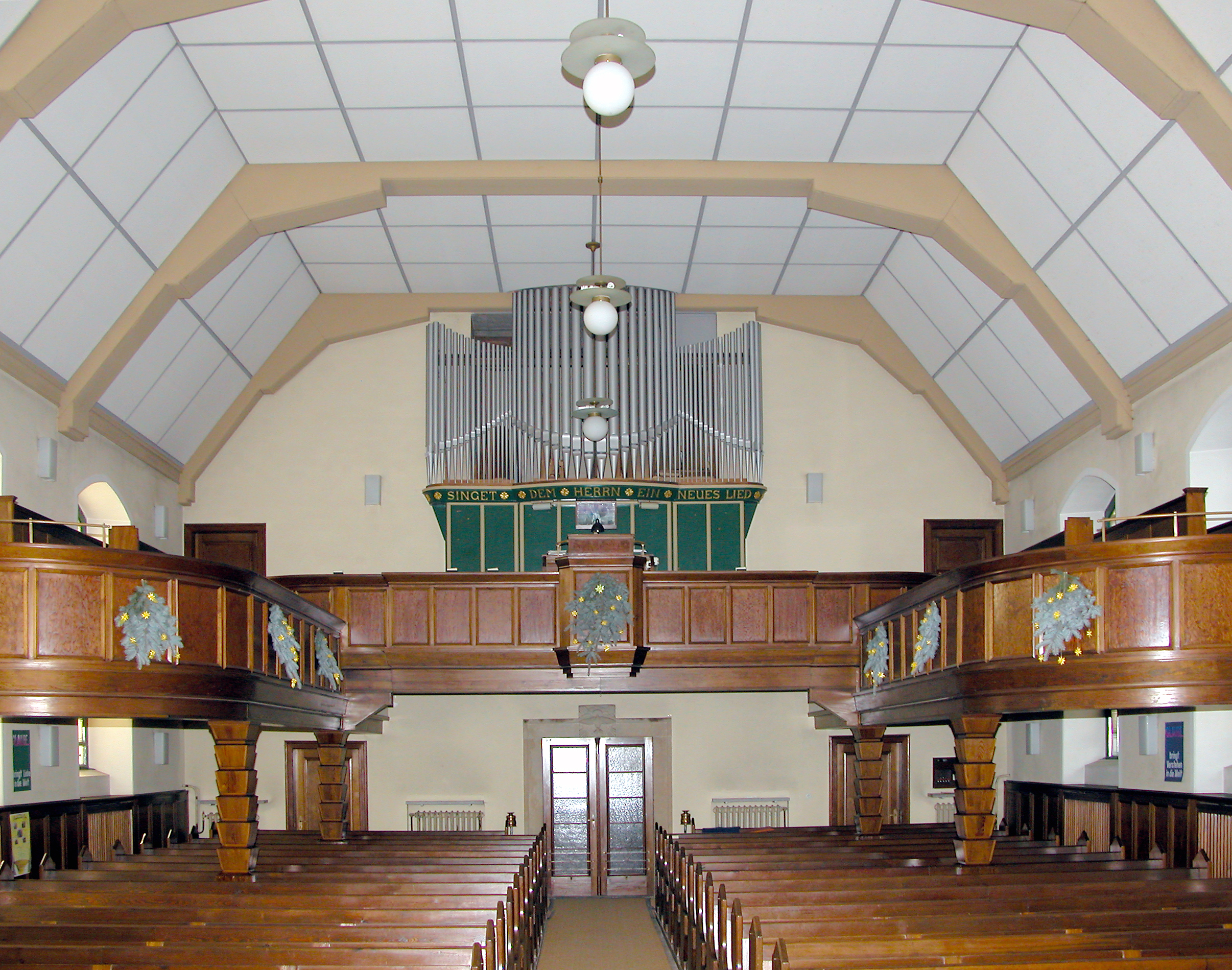 30.01.2010 01734 Oelsa (Rabenau): Evangelische Kirche Oelsa, Pfarrweg 12 (GMP: 50.950678,13.666927). Schlichte Saalkirche aus der Mitte der 1920er Jahre. [DSCN40372.TIF]20100130025DR.JPG(c)Blobelt